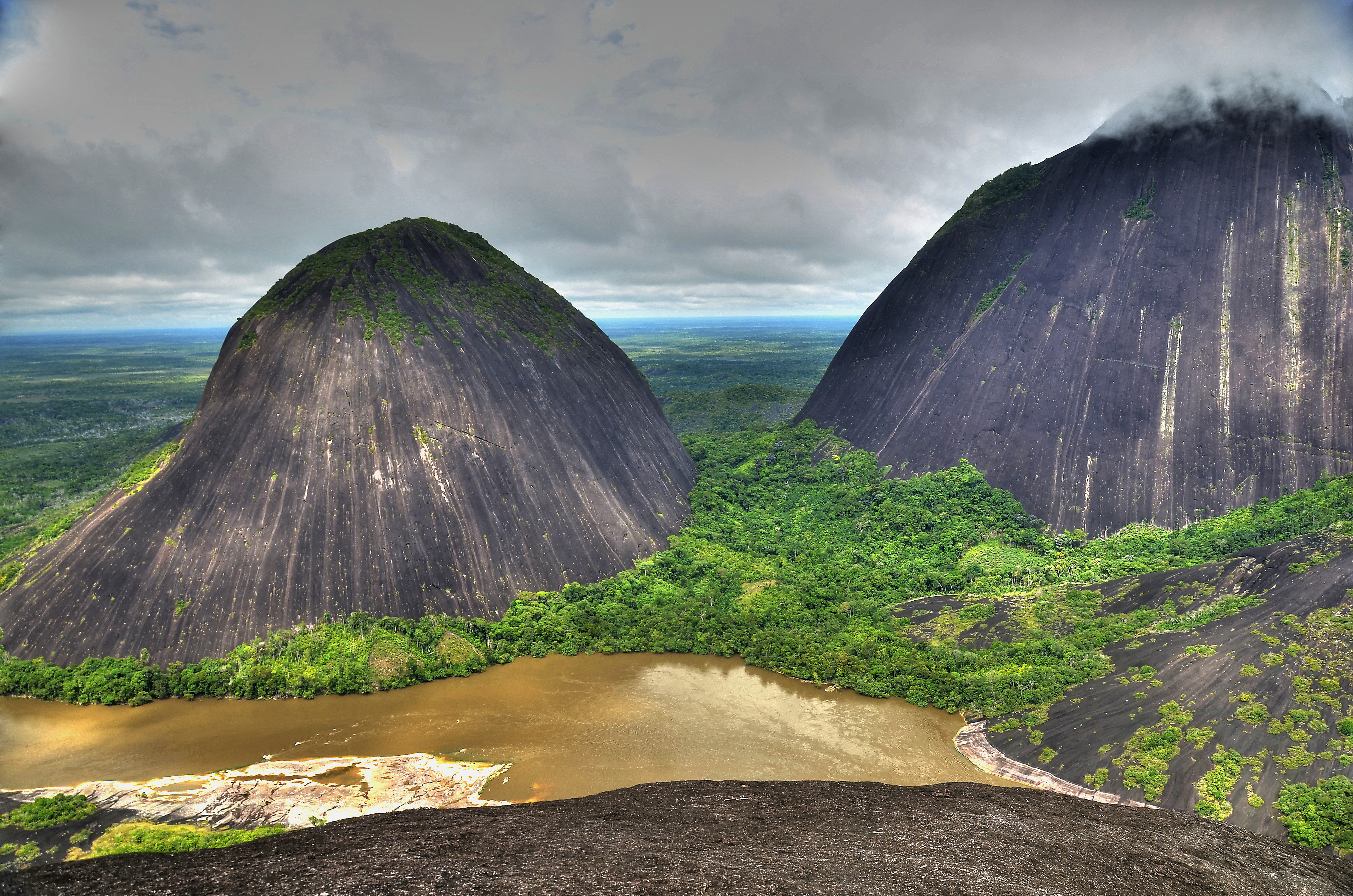 En el sector de Mavecure sobre el río Inirida se encuentran tres enormes rocas que conforman un espectáculo único y hermoso en el departamento de Guainia - Colombia Esta fotografía fue tomada en un área protegida de Colombia con el código 539 del RUNAP.